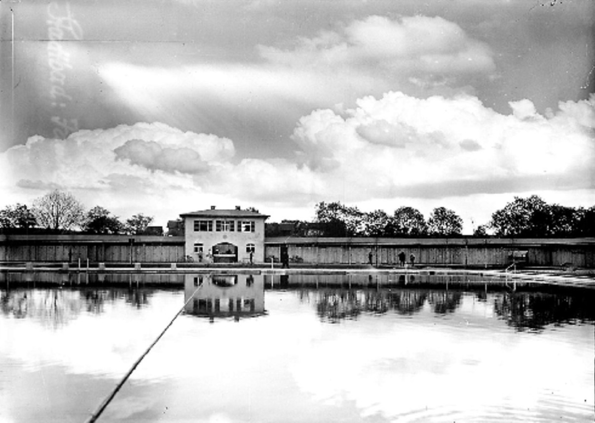 Stadtbad in Kempten. Bild vom Bau und Eröffnung des Bades.